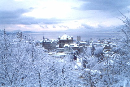 Blick auf die Altstadt von Lausanne mit dem Genfersee.